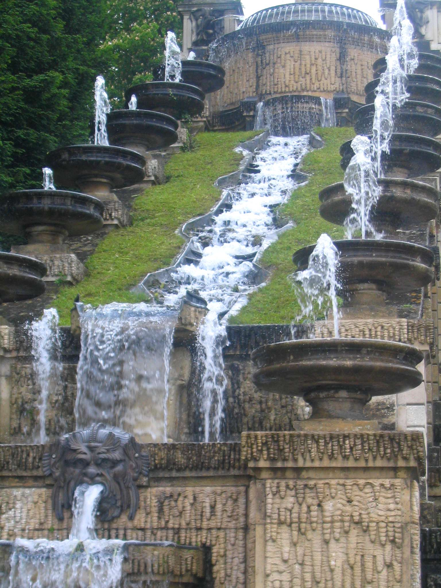 Parc de Saint-Cloud, France - Fontaine de Le Pautre (1660-1665)